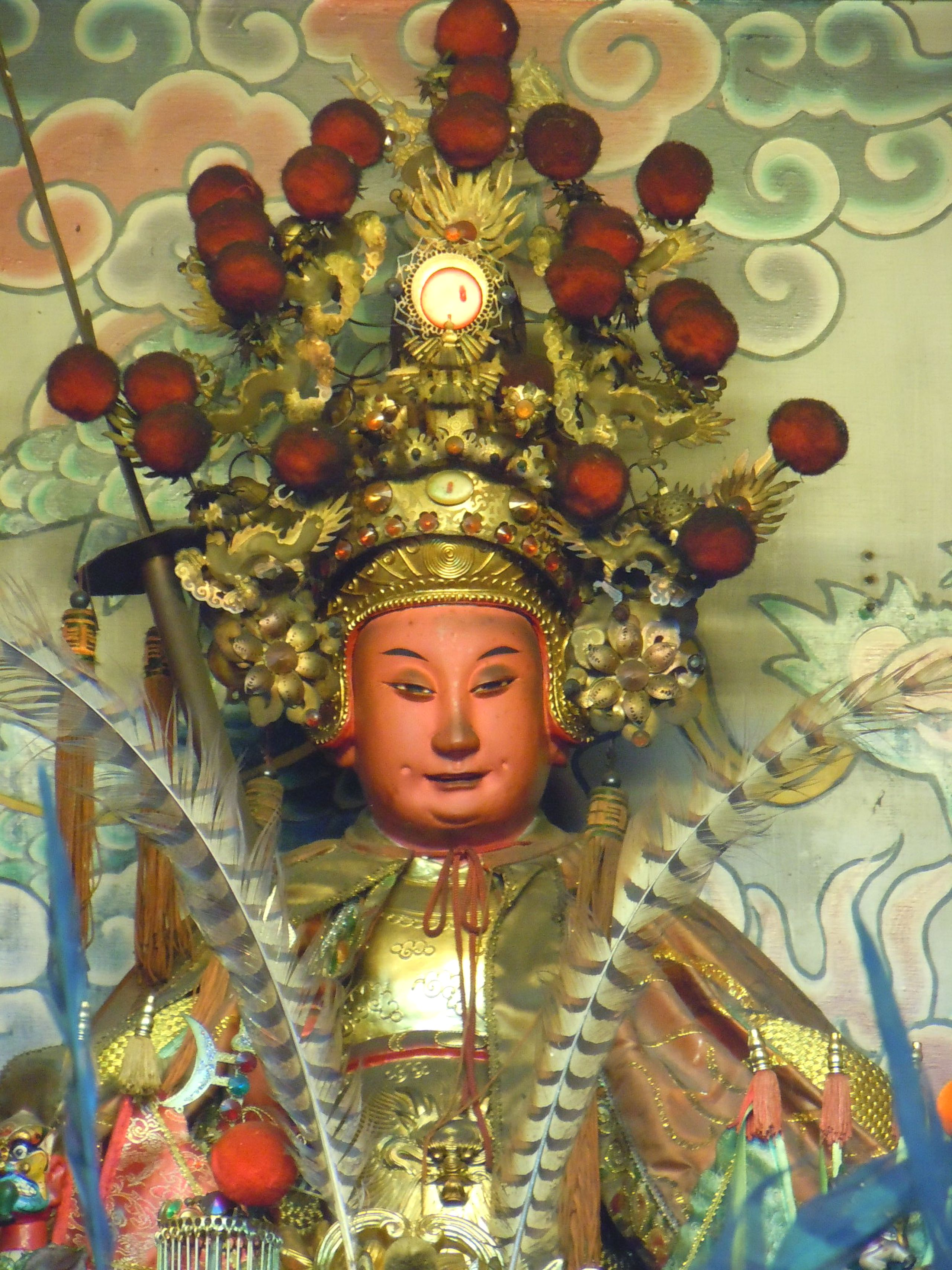 中文（台灣）: 港尾太子宮地址：臺中市西屯區港尾里同志巷。